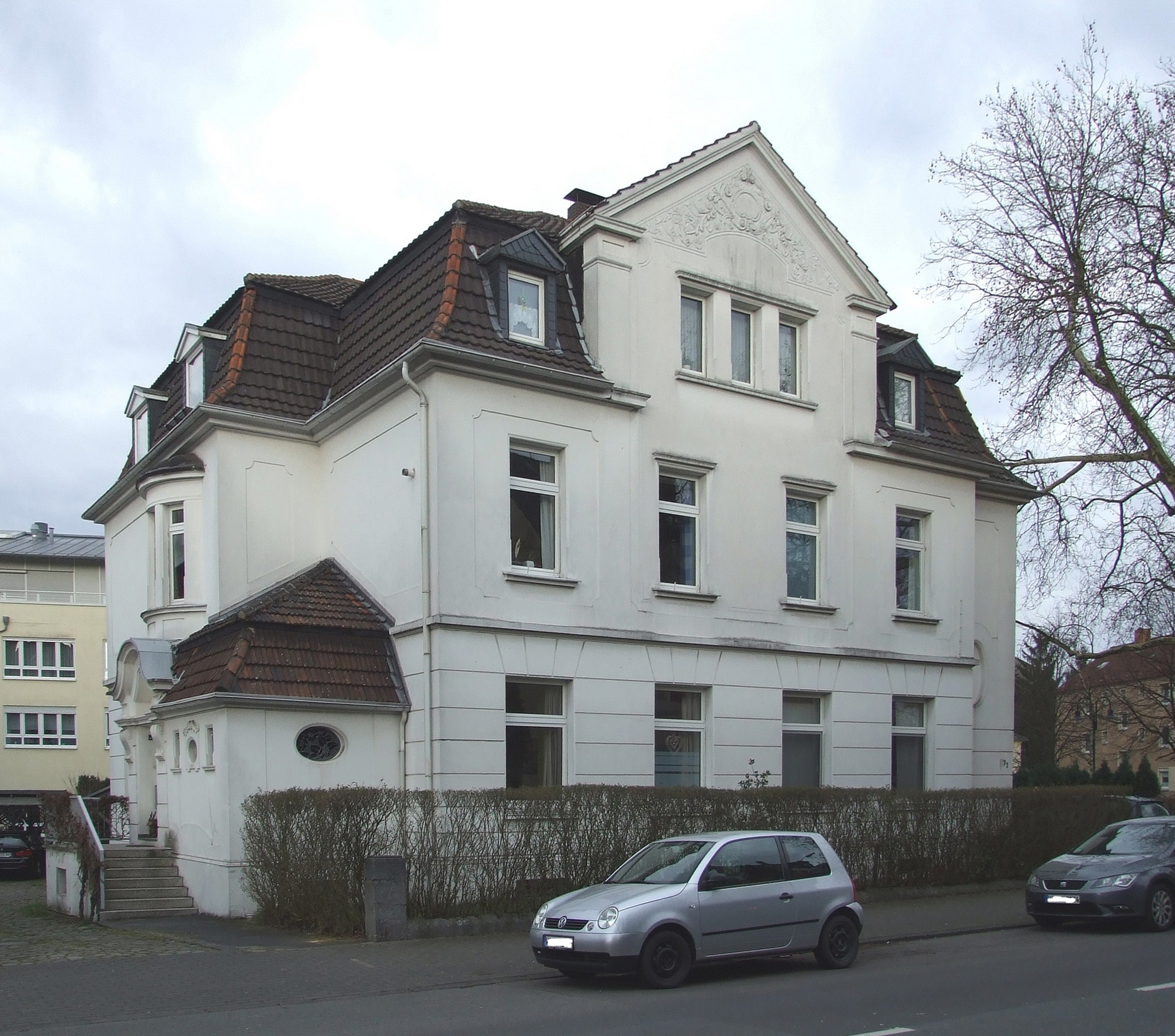 Herne, Edmund-Weber-Straße 72 von Westen